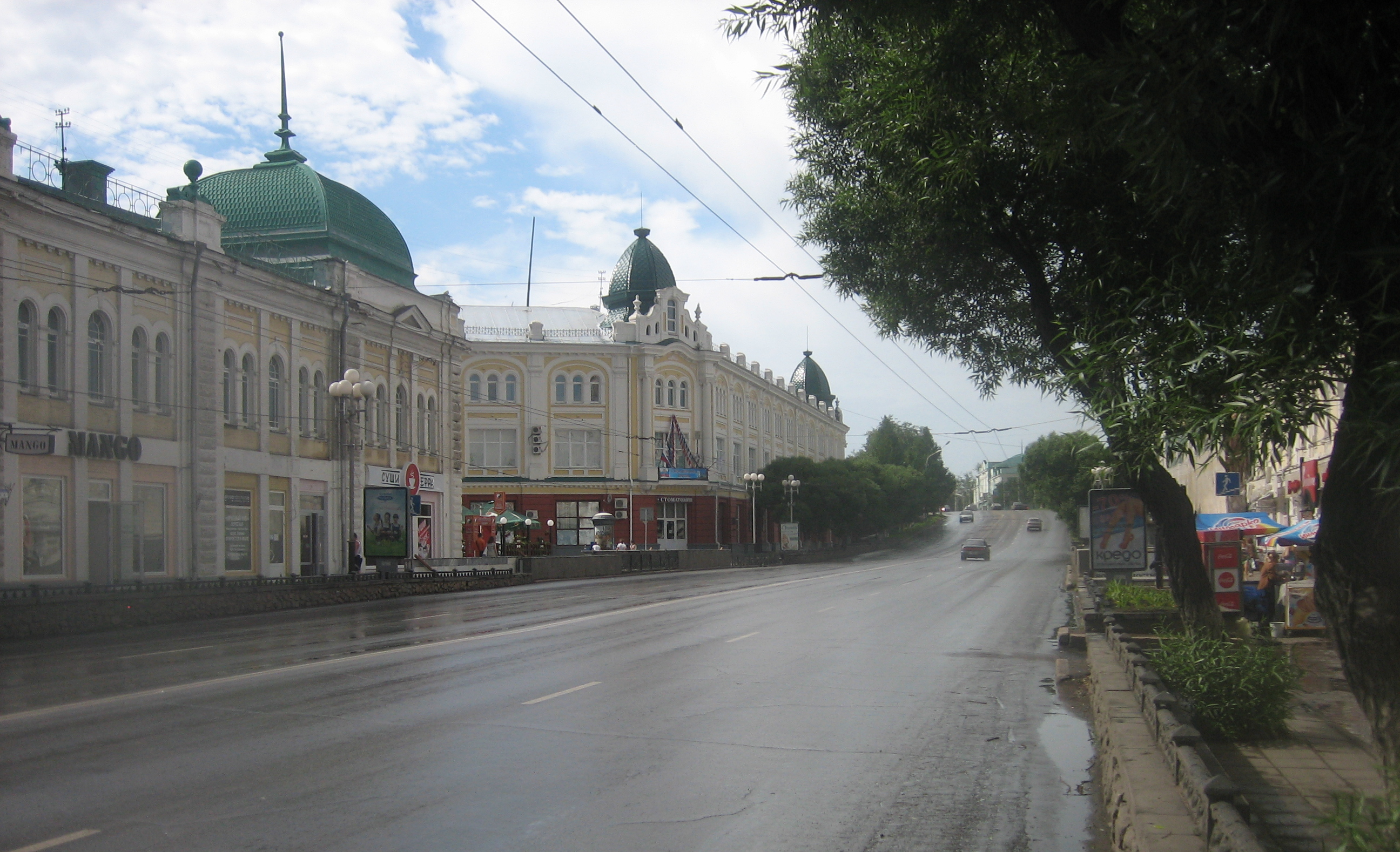 город Омск улица Ленина(бывший Любинский проспект)